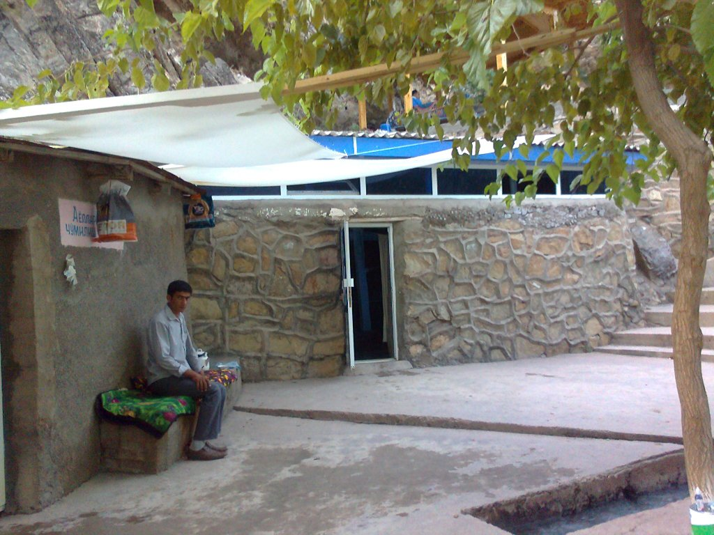 Хужайпок Маскани - это достопримечательность Южной части Узбекистана (Сурхандарьинская область) у подножьях гор и целебным источником. Целебная ванна из водородо-хлористого источника. Лечит кожно-инфекционных болезней и трудноизлечивающихся ран.